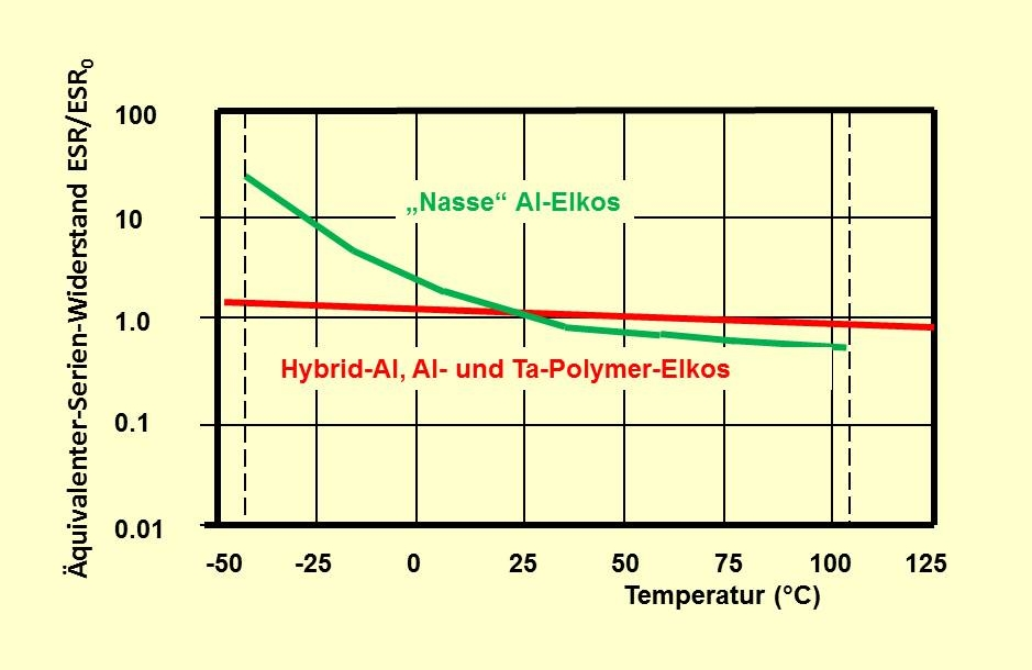 ESR von Al-Elkos und Polymer-Elkos in Abhängigkeit von der Temperatur